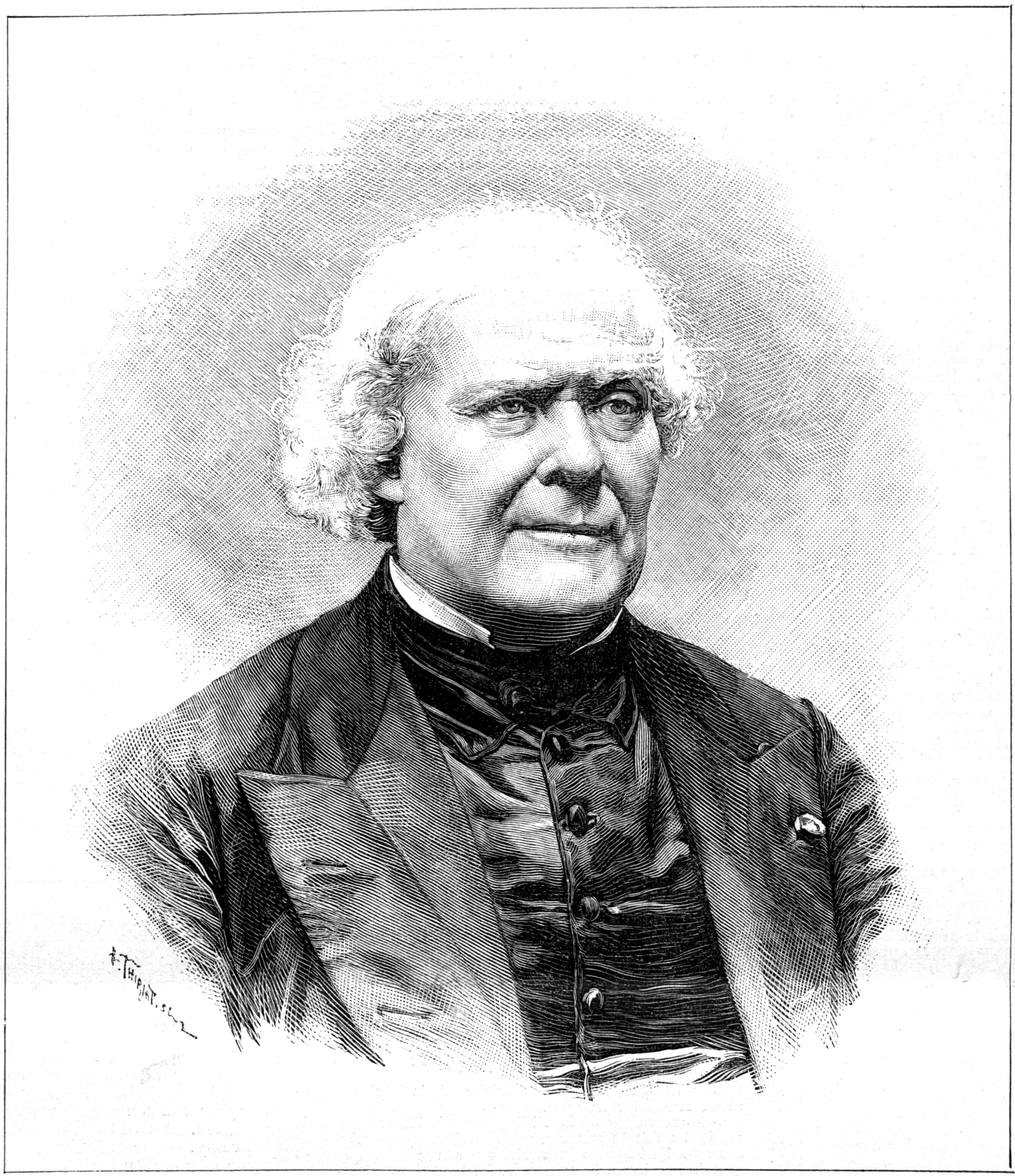 Paul Lacroix (1806–1884)